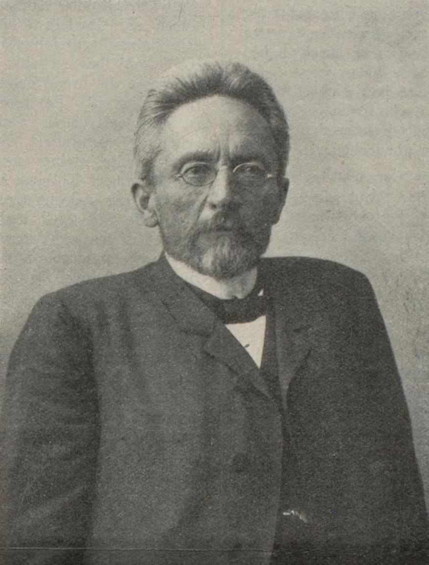 Porträtfoto von Georg Franzius